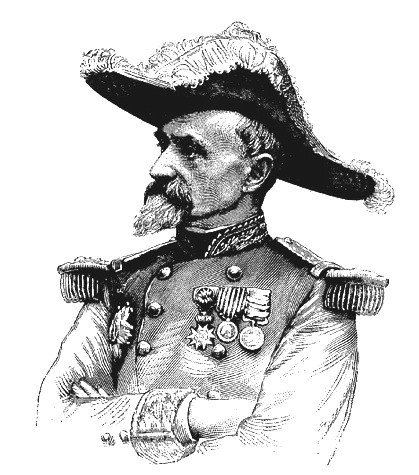 "M. le général Montaudon, élu député de la Somme le 6 janvier".